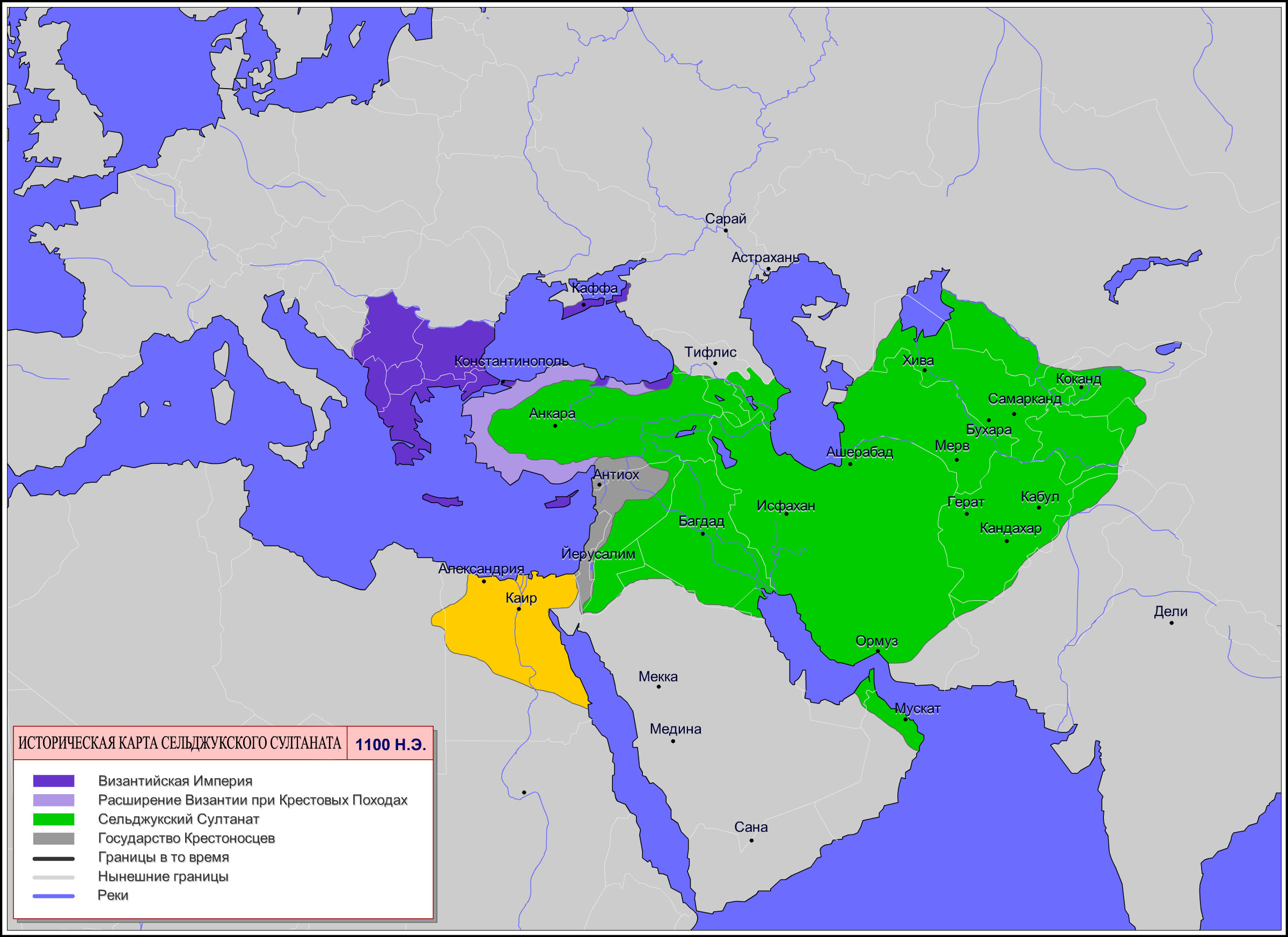 Карта Сельджукского Султаната